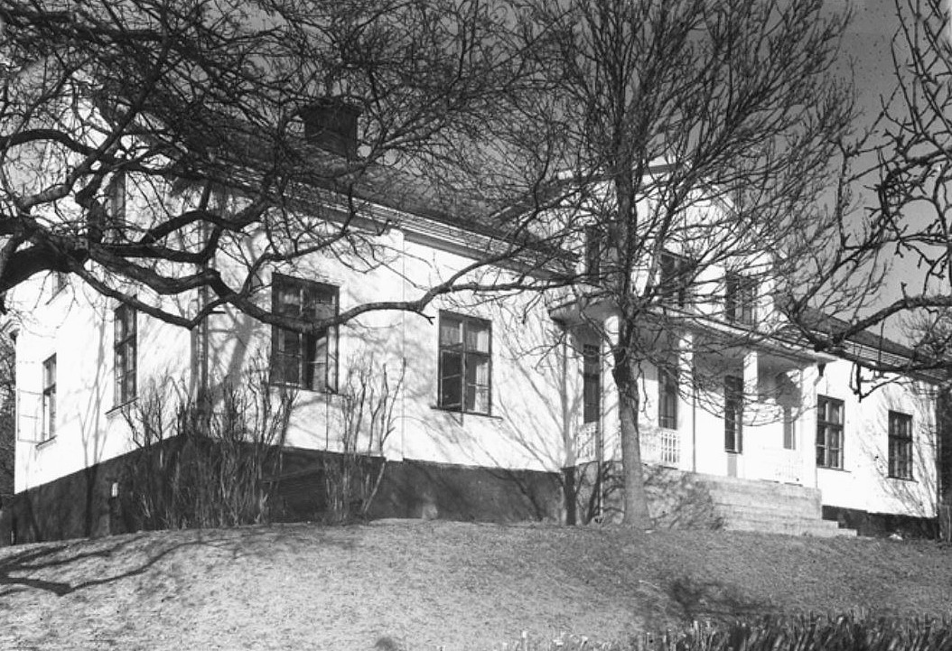 Vista gårds huvudbyggnad